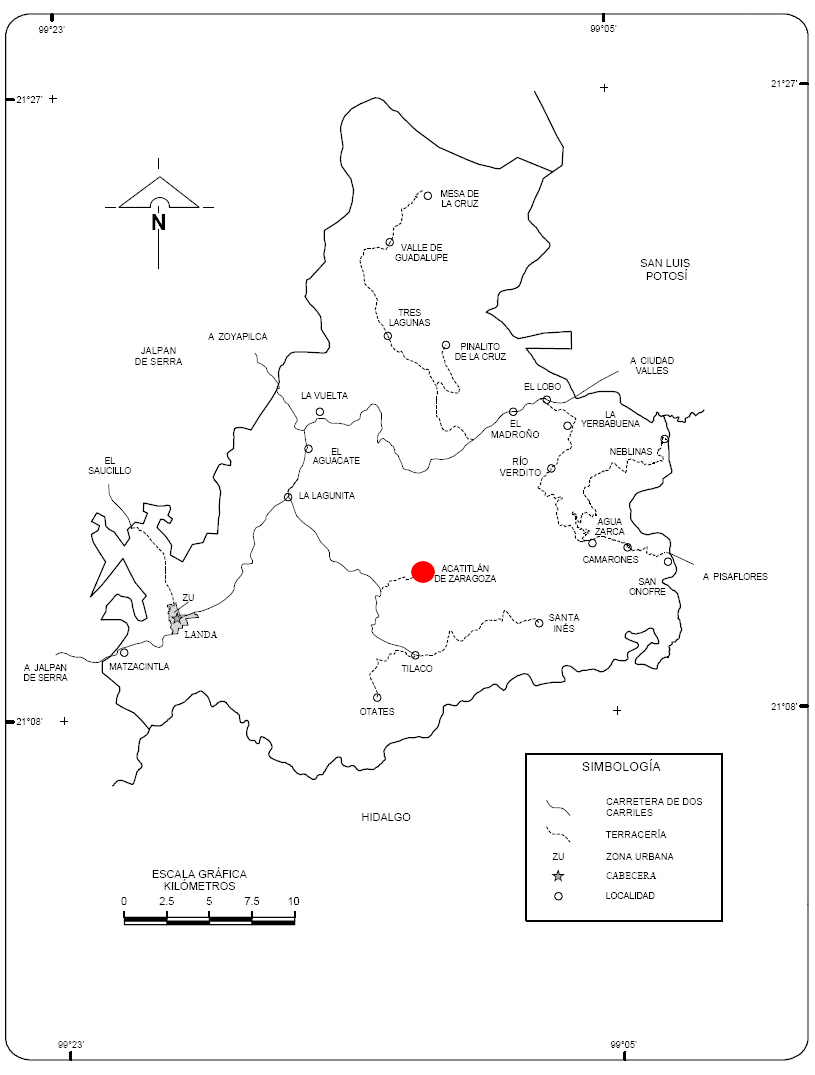 Map